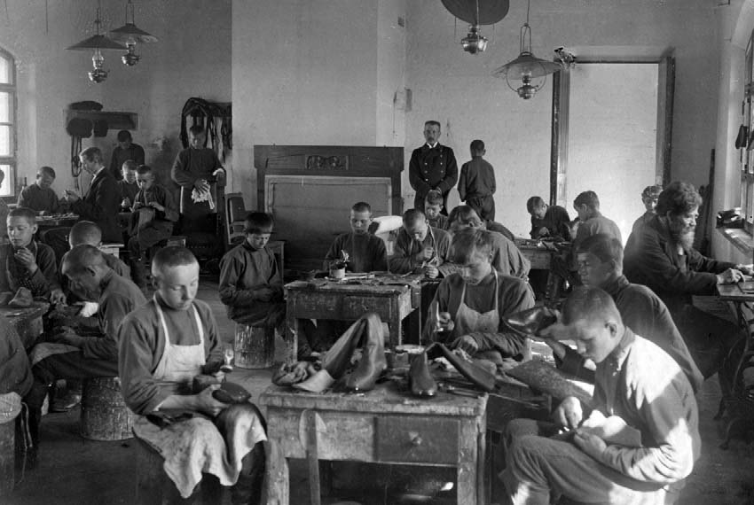 Воспитанники Рукавишниковского приюта за работой в мастерской